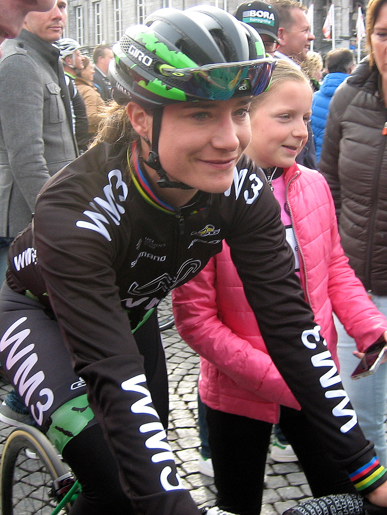 Start van de Amstel Gold Race Ladies Edition 2017 in Maastricht.